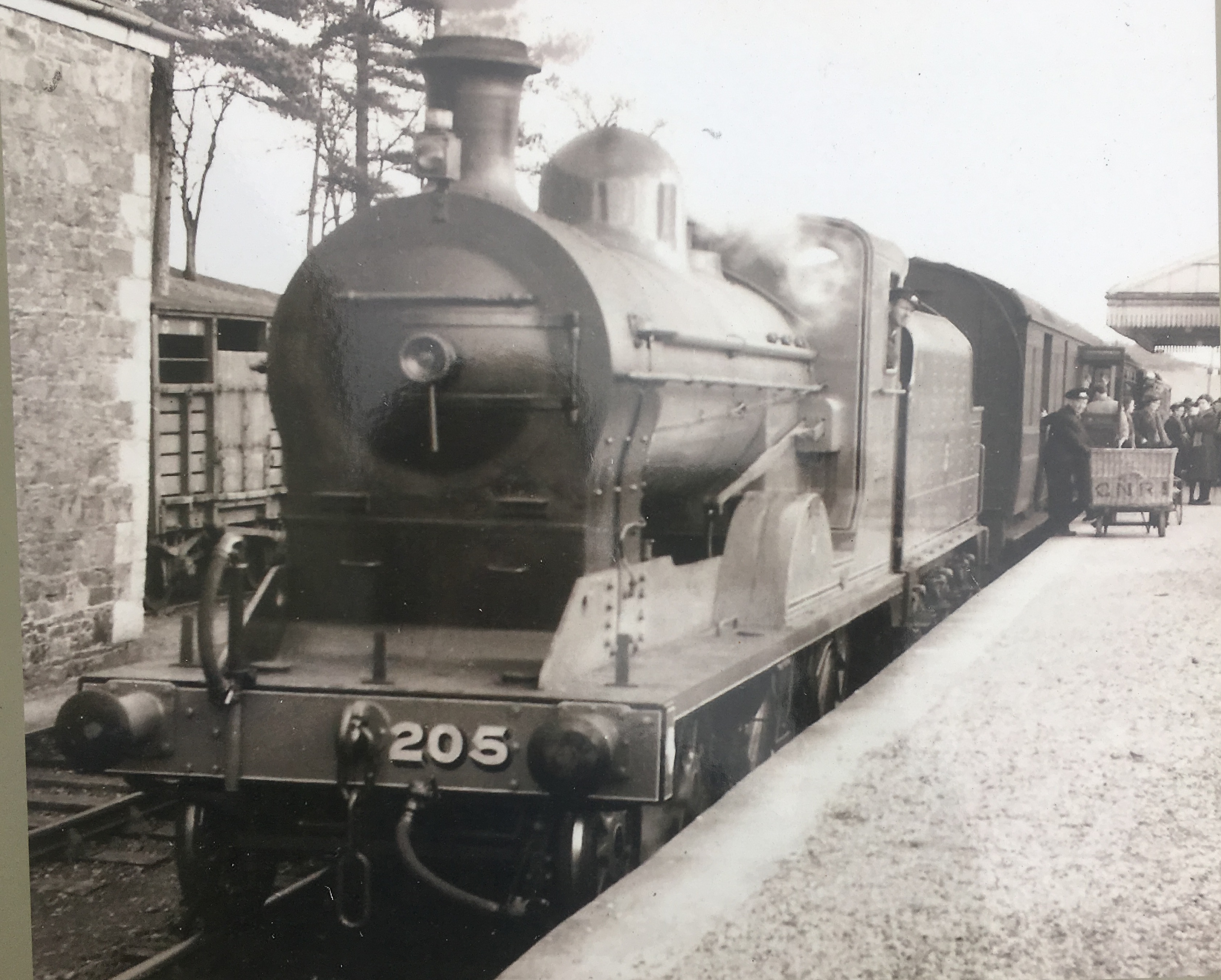 An Tiarnród.